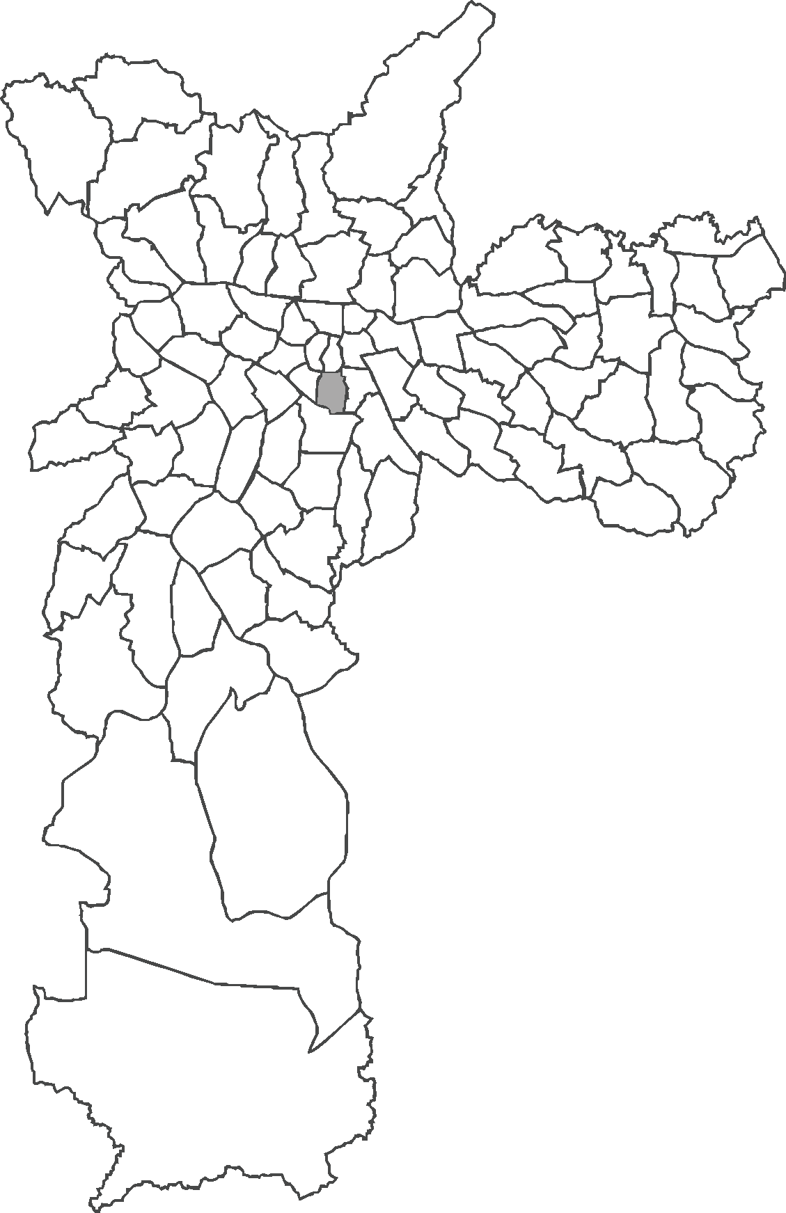 Localização do distrito da Liberdade no município de São Paulo.